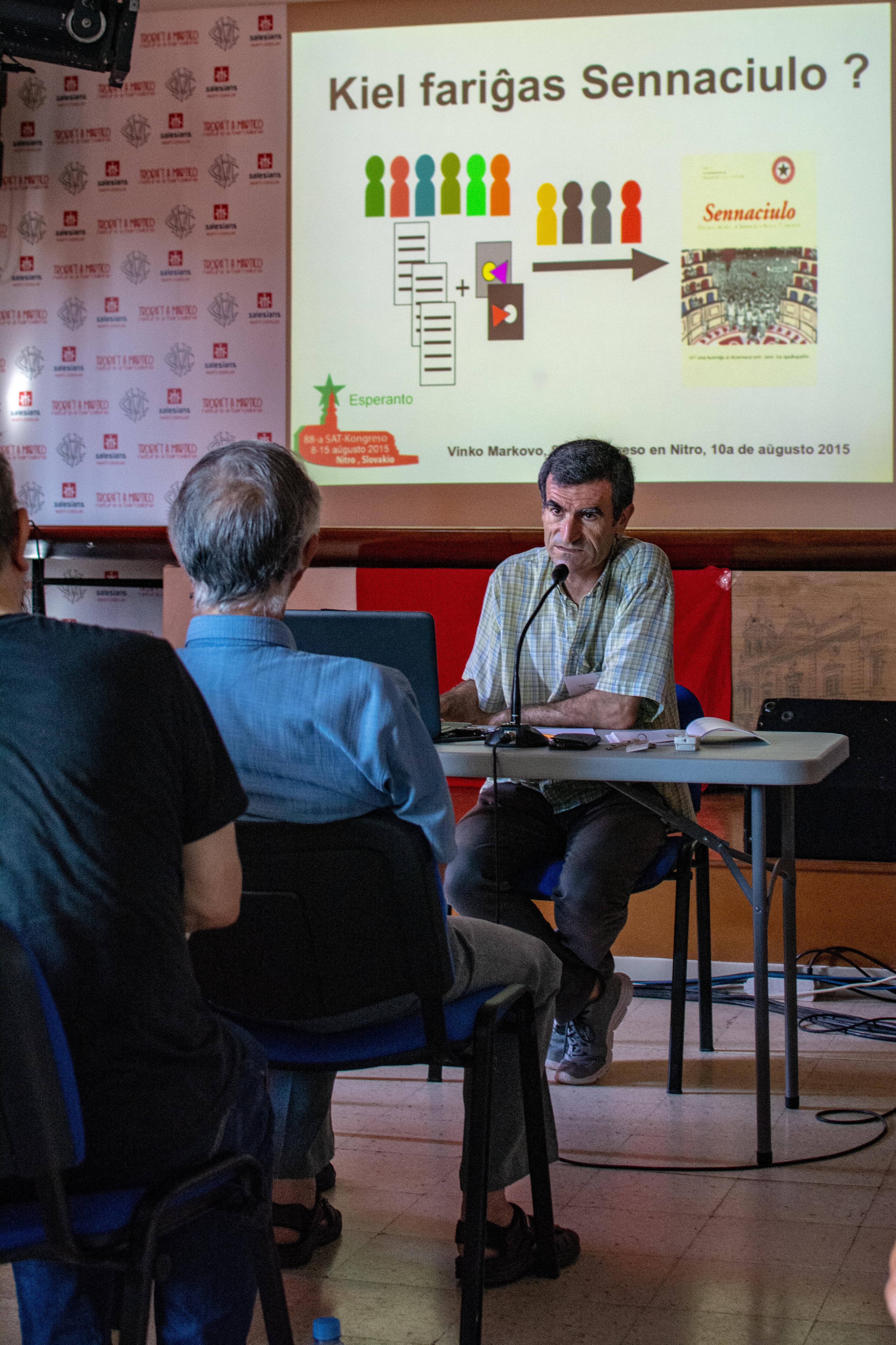 Prezento de la gazeto Sennaciulo dum la SAT-Kongreso 2019